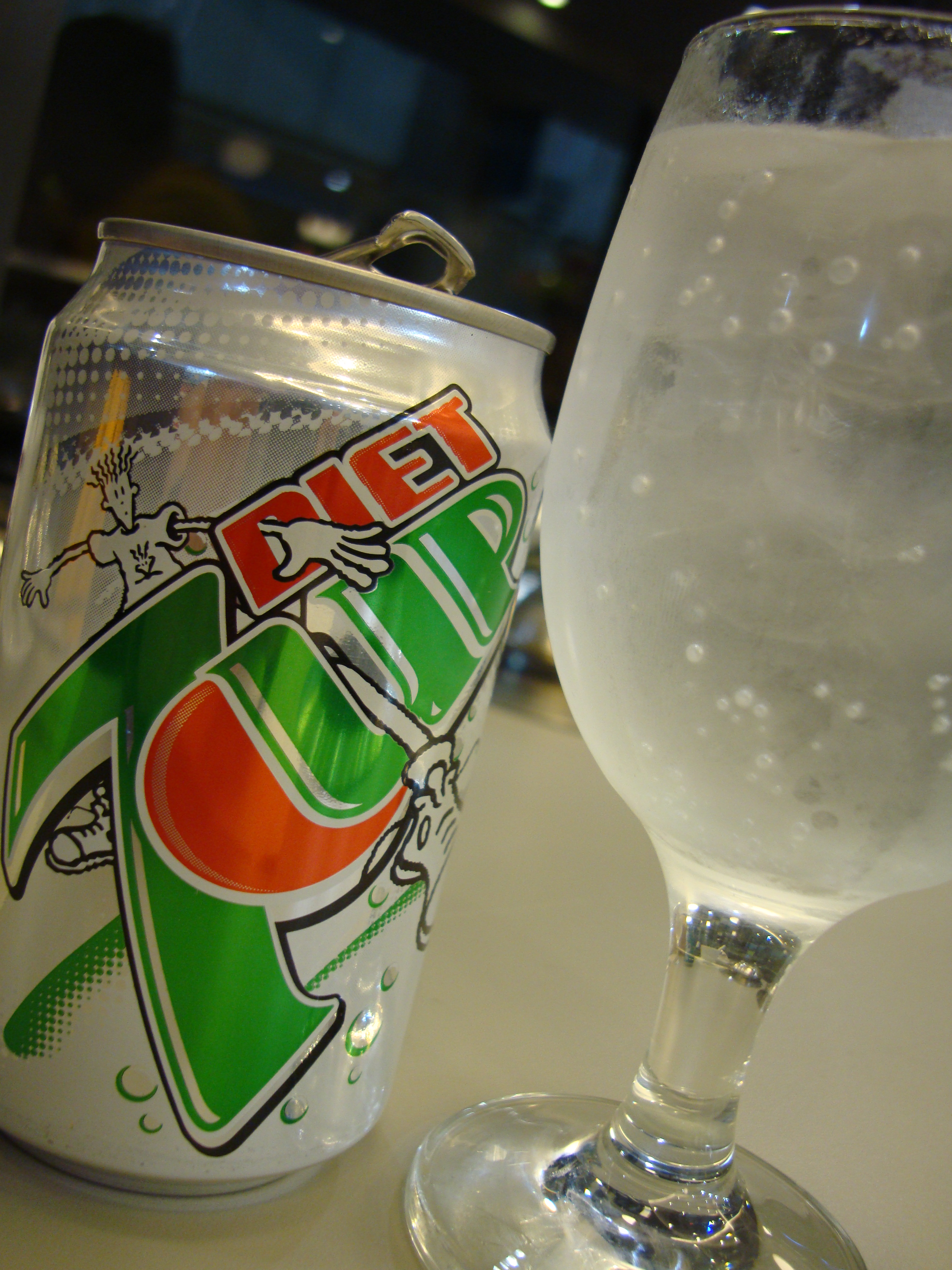 Osmenia